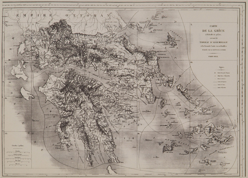 Carte de la Grèce à l'Echelle de 900000 servant de Tableau d'Assemblage à la Grande Carte en 20 feuilles publiée par - Peytier Eugène